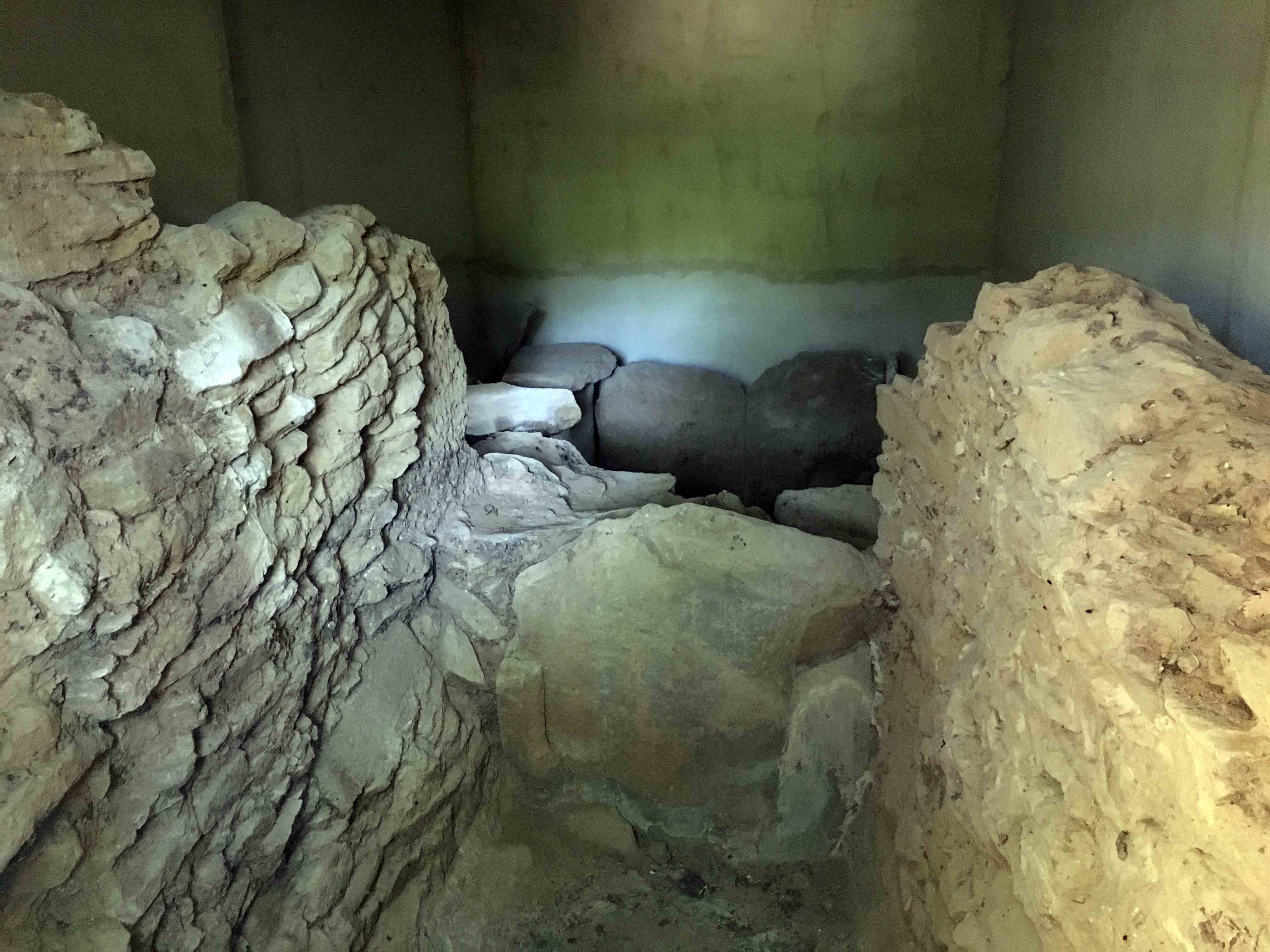 Interno del Tumulo A nella necropoli di Prato Rosello